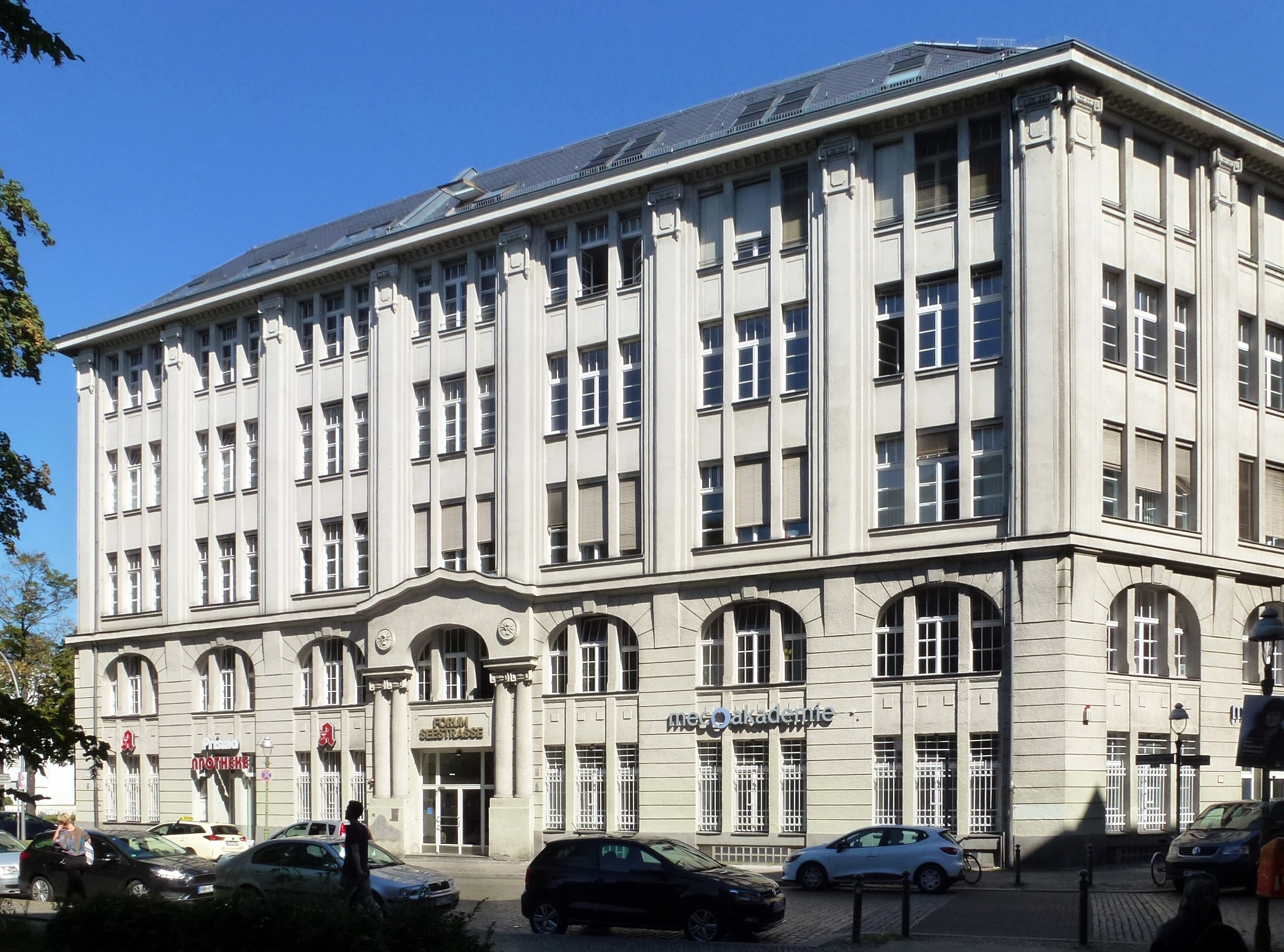 Berlin-Wedding Osram-Höfe Oudenarder Straße Verwaltung